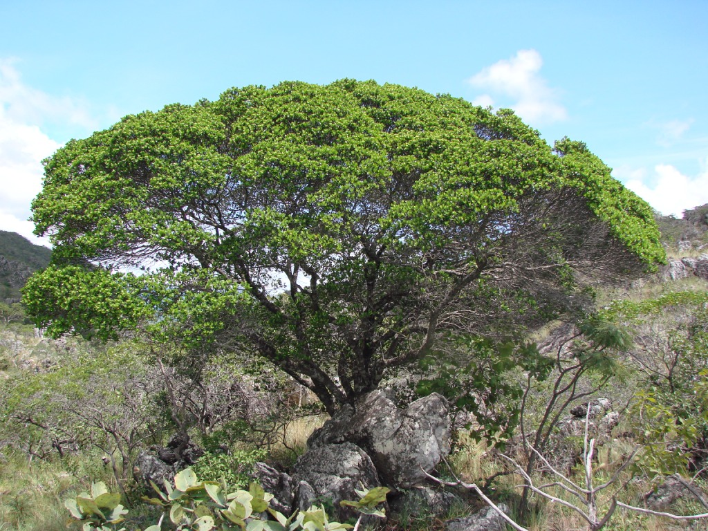 Humiria balsamifera - HUMIRIACEAE Parque Nacional da Chapada dos Veadeiros - Cavalcante - Goiás - Brasil.